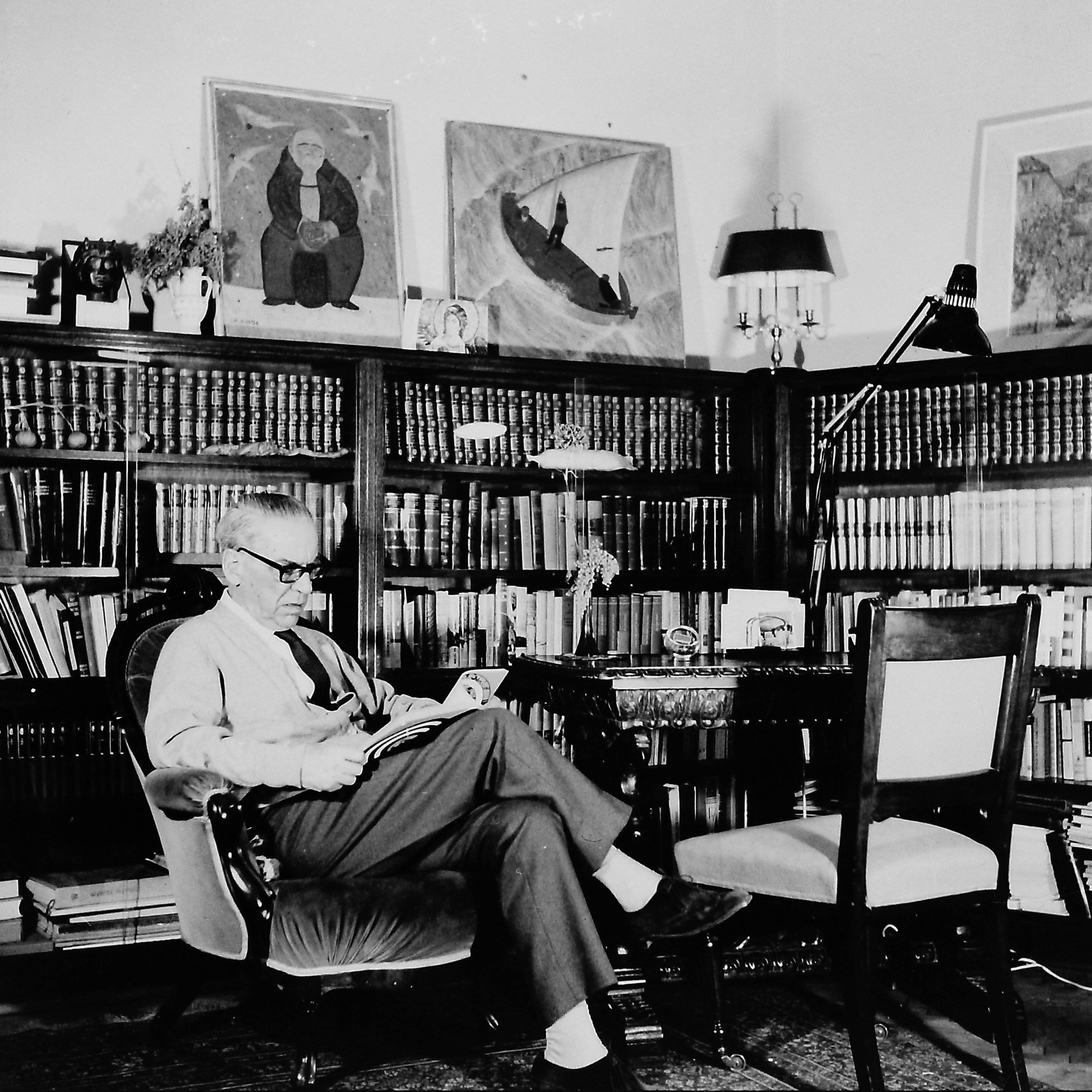 Ivo Andrić u svom domu. foto:Stevan Kragujević (po odobrenju kćerke Tanje Kragujević)